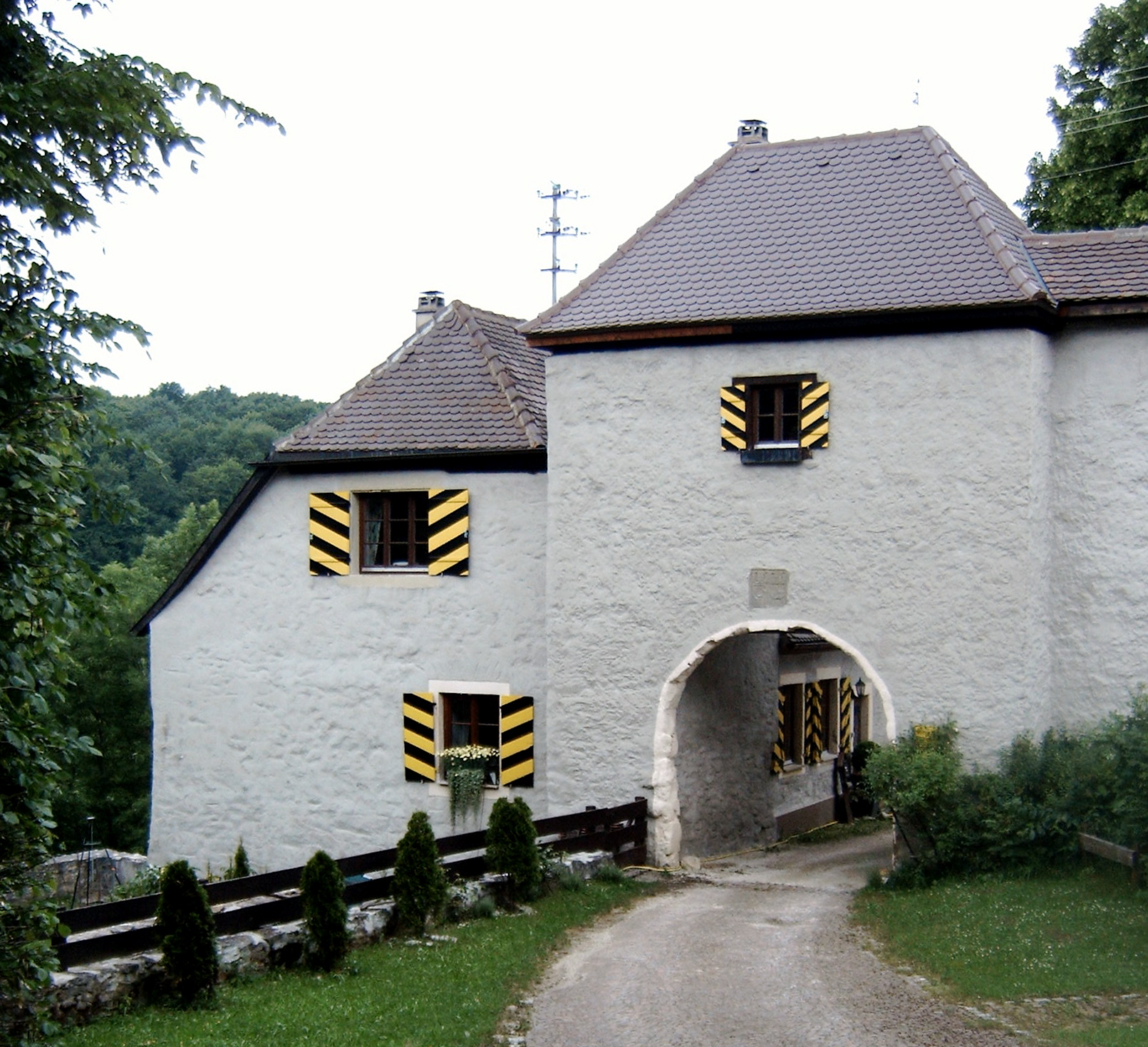 Eingang zur Burg Lauterburg (Essingen (Württemberg))